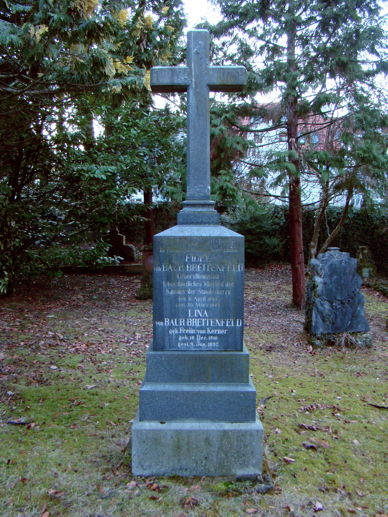 Alter Friedhof in Ludwigsburg, Grabstelle von Fidel von Baur-Breitenfeld